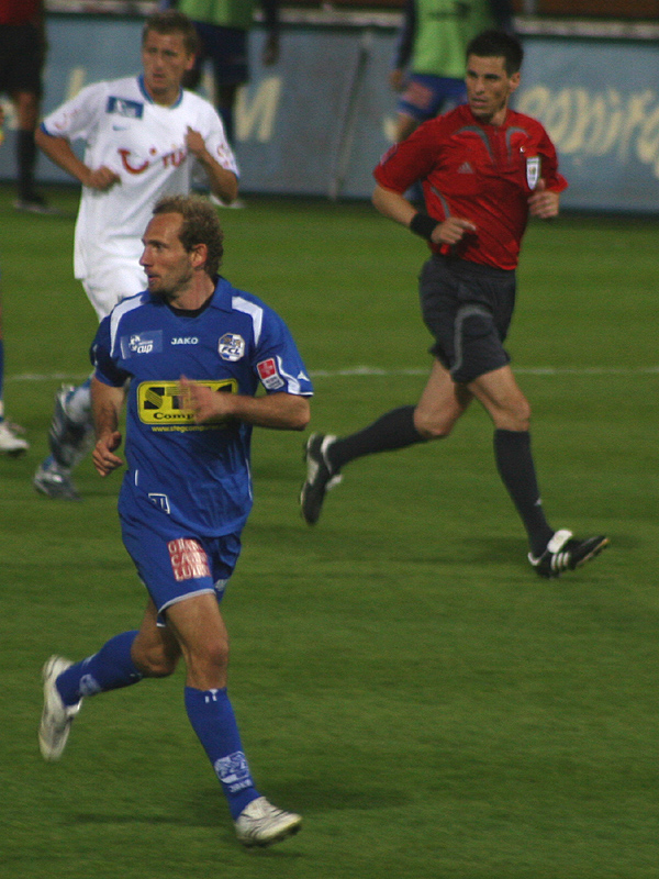 Mauro Lustrinelli, FC Luzern, Hardturm Stadion (Schweiz), Cup-Halbfinal, FC Zürich – FC Luzern 2:3